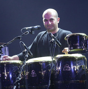 همایون نصیری کنسرت گروه دارکوب٬ برج میلاد تهران ۶ خرداد ۱۳۹۶